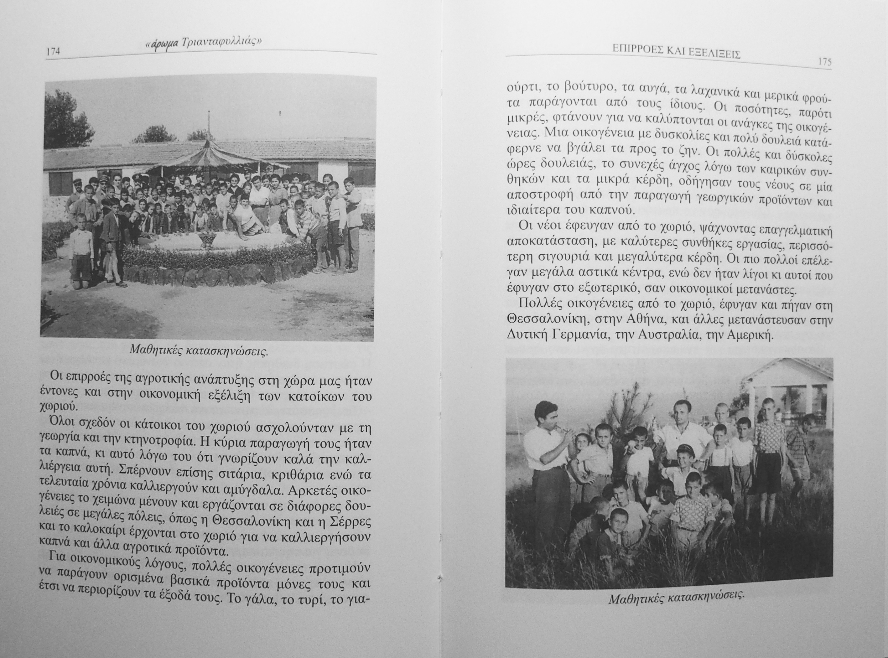 Άρωμα Τριανταφυλλιάς, σελίδα 101